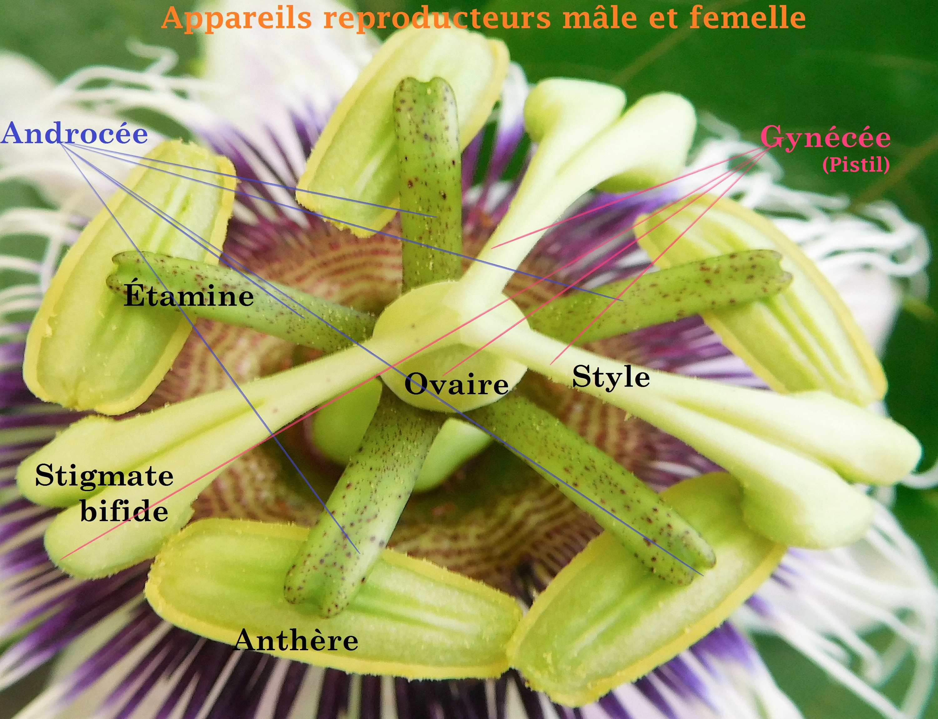 Organe sexuel de Passiflora edulis